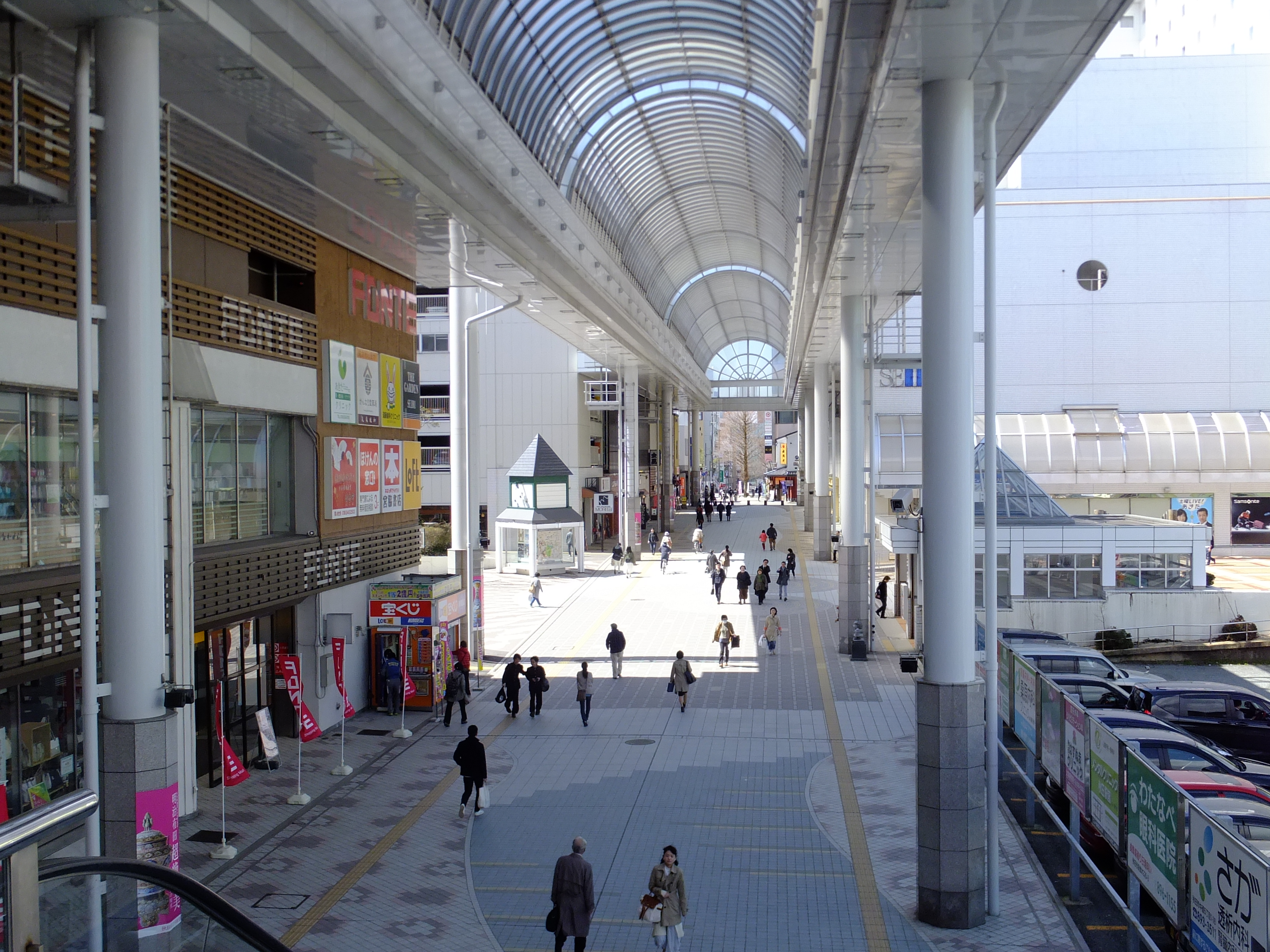 秋田駅前、仲小路の大屋根。西武秋田店付近までの短いアーケード区間である。